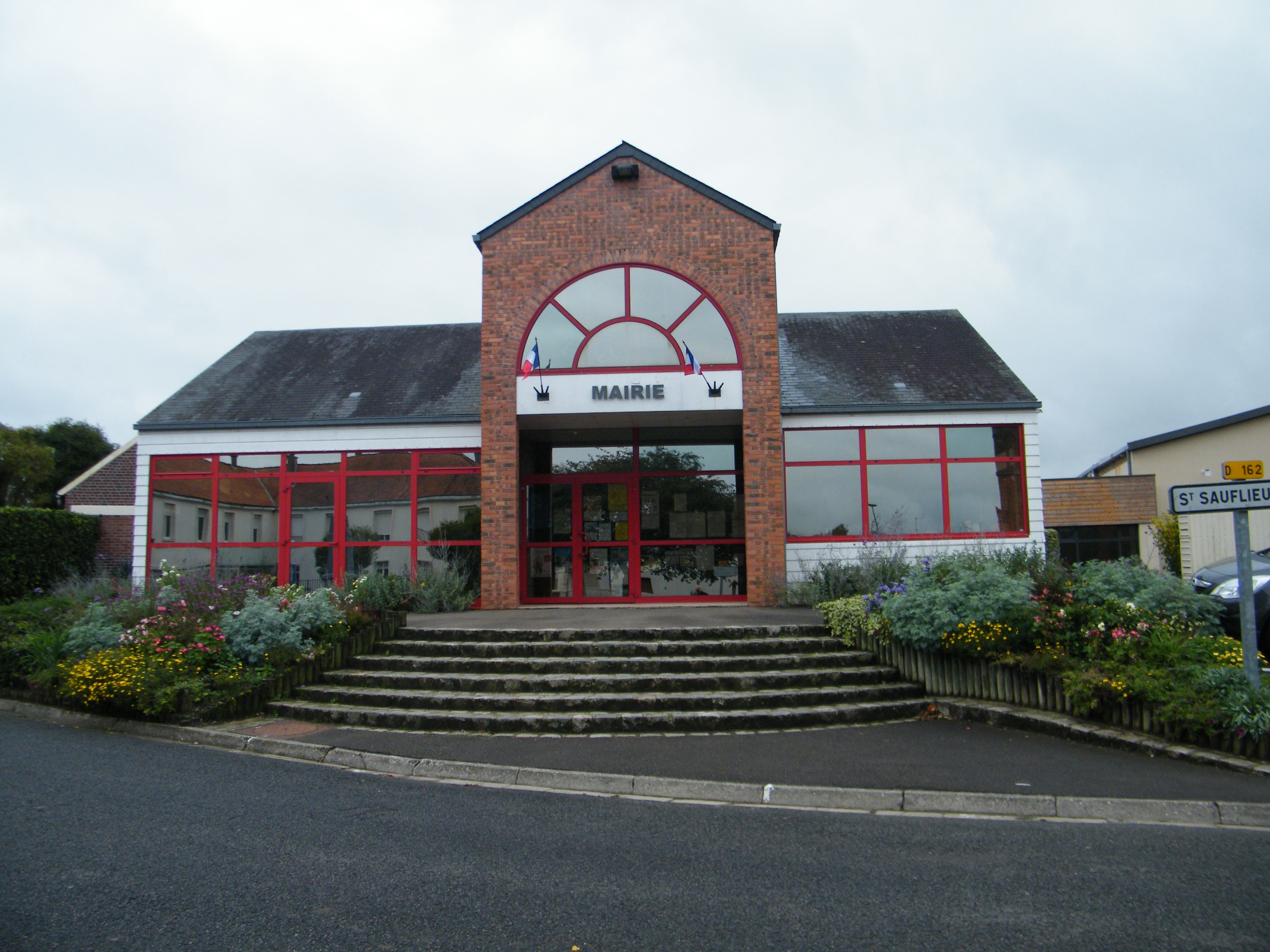 Mairie.